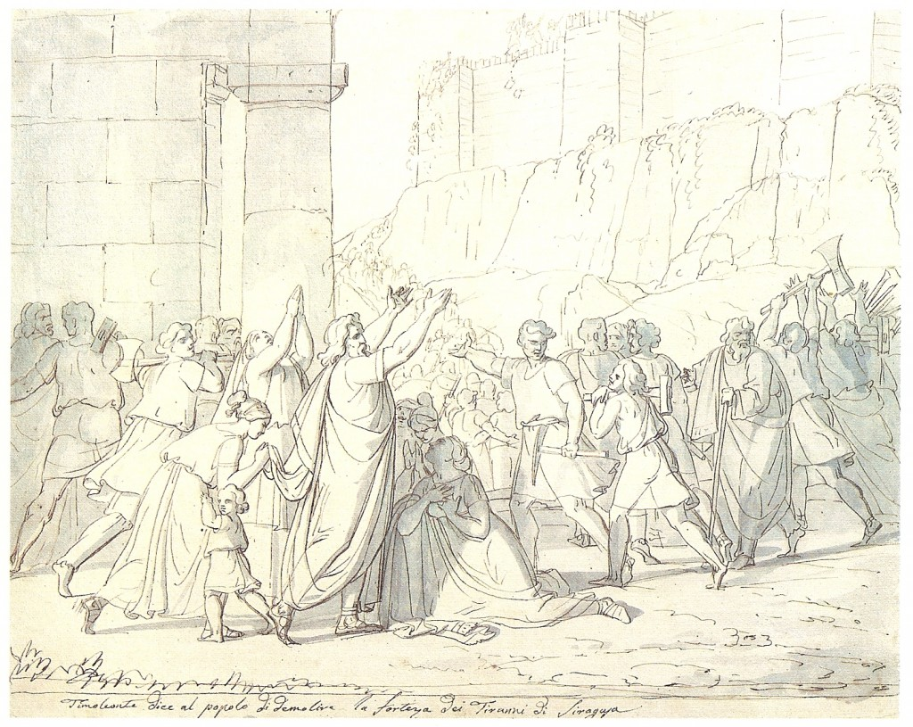 “Timoleonte dice al popolo di demolire la fortezza dei tiranni di Siracusa” – Giuseppe Patania (Palermo – Galleria Regionale della Sicilia)